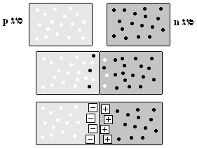 איור לערך he:מוליך למחצה.